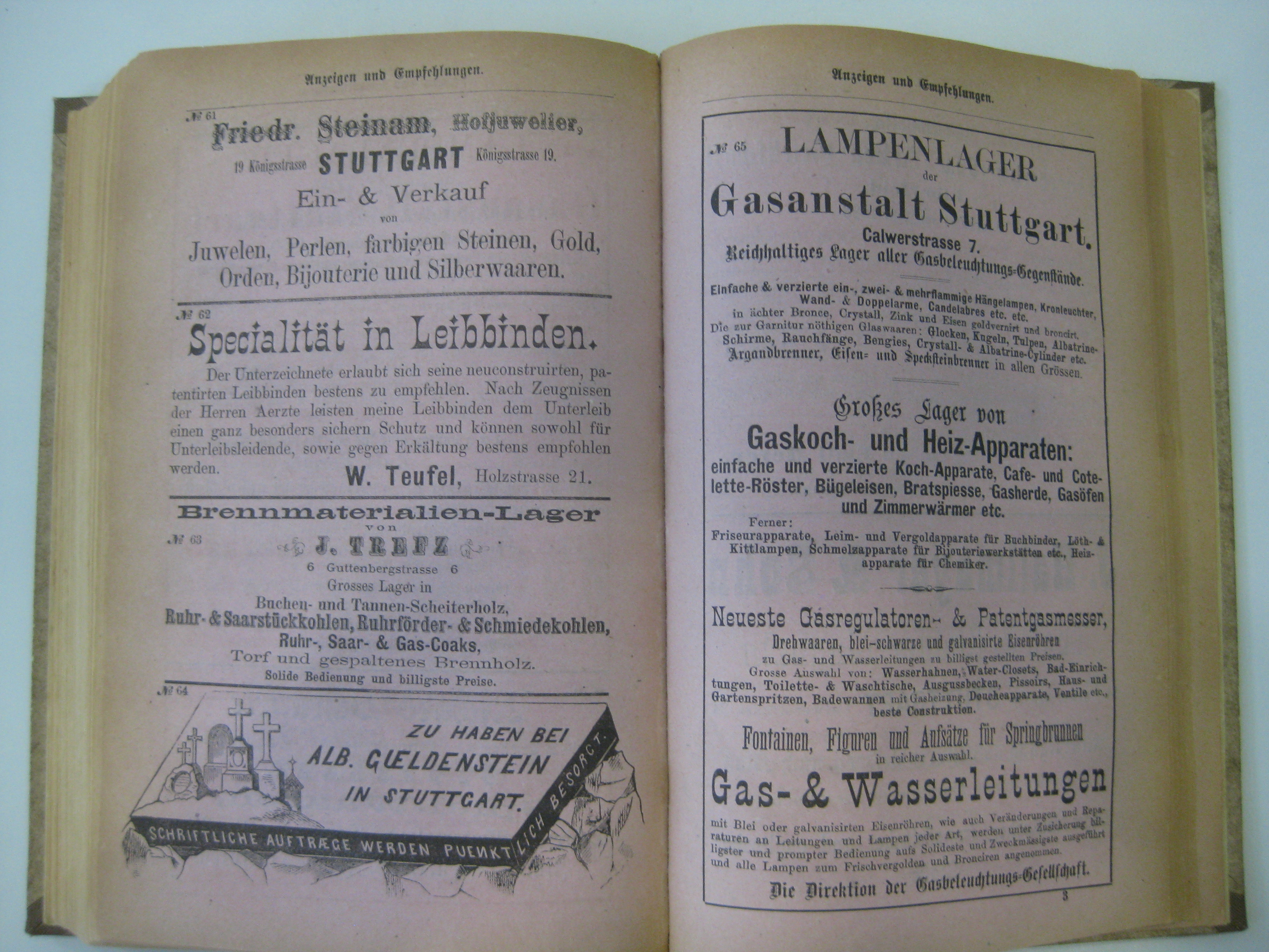 Albert Güldenstein: Grabmälerwerbung im Adreß- und Geschäfts-Handbuch der Königlichen Haupt- und Residenzstadt Stuttgart für das Jahr 1870.